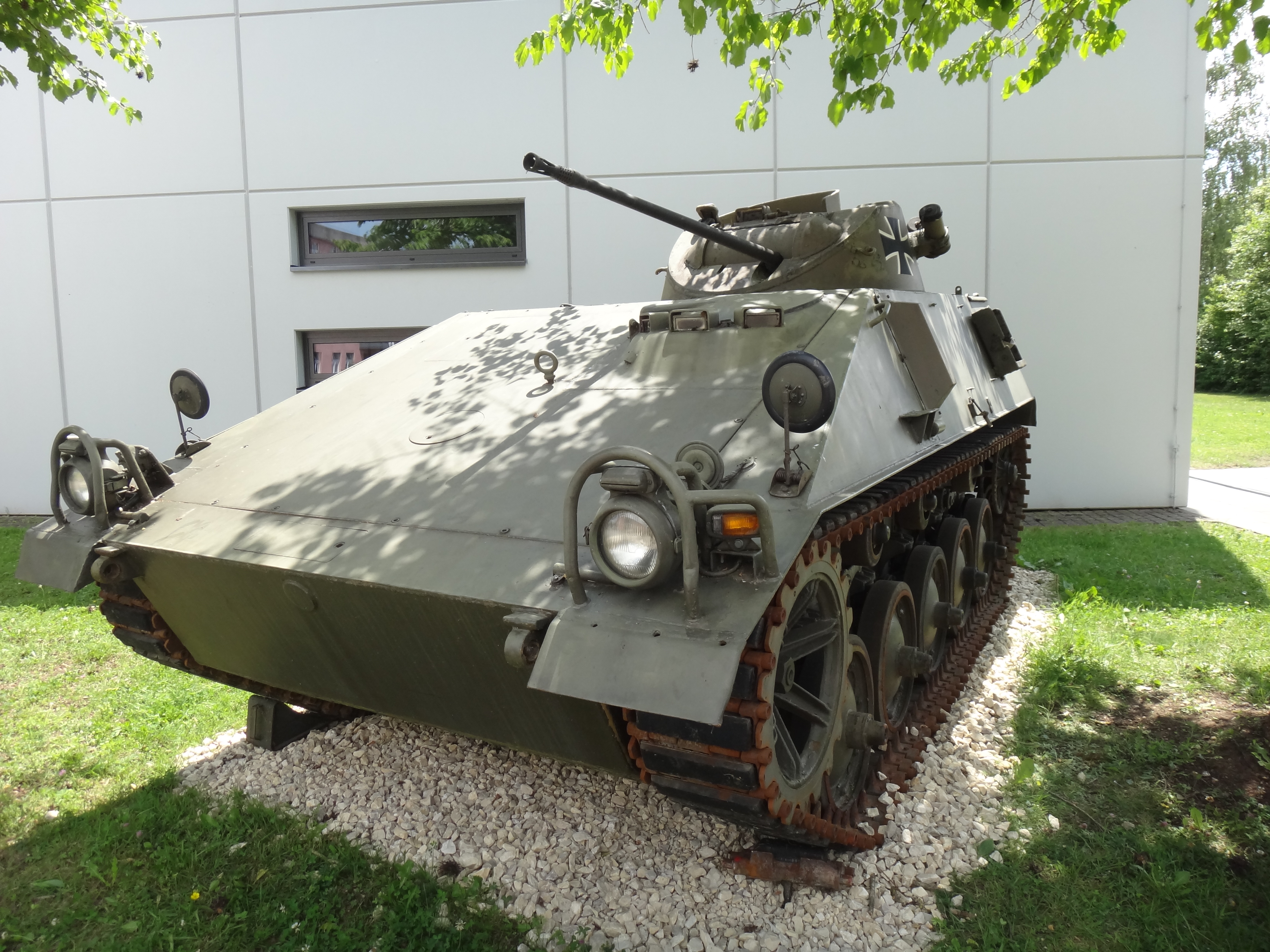 Spz kurz Hotchiss Voderansicht